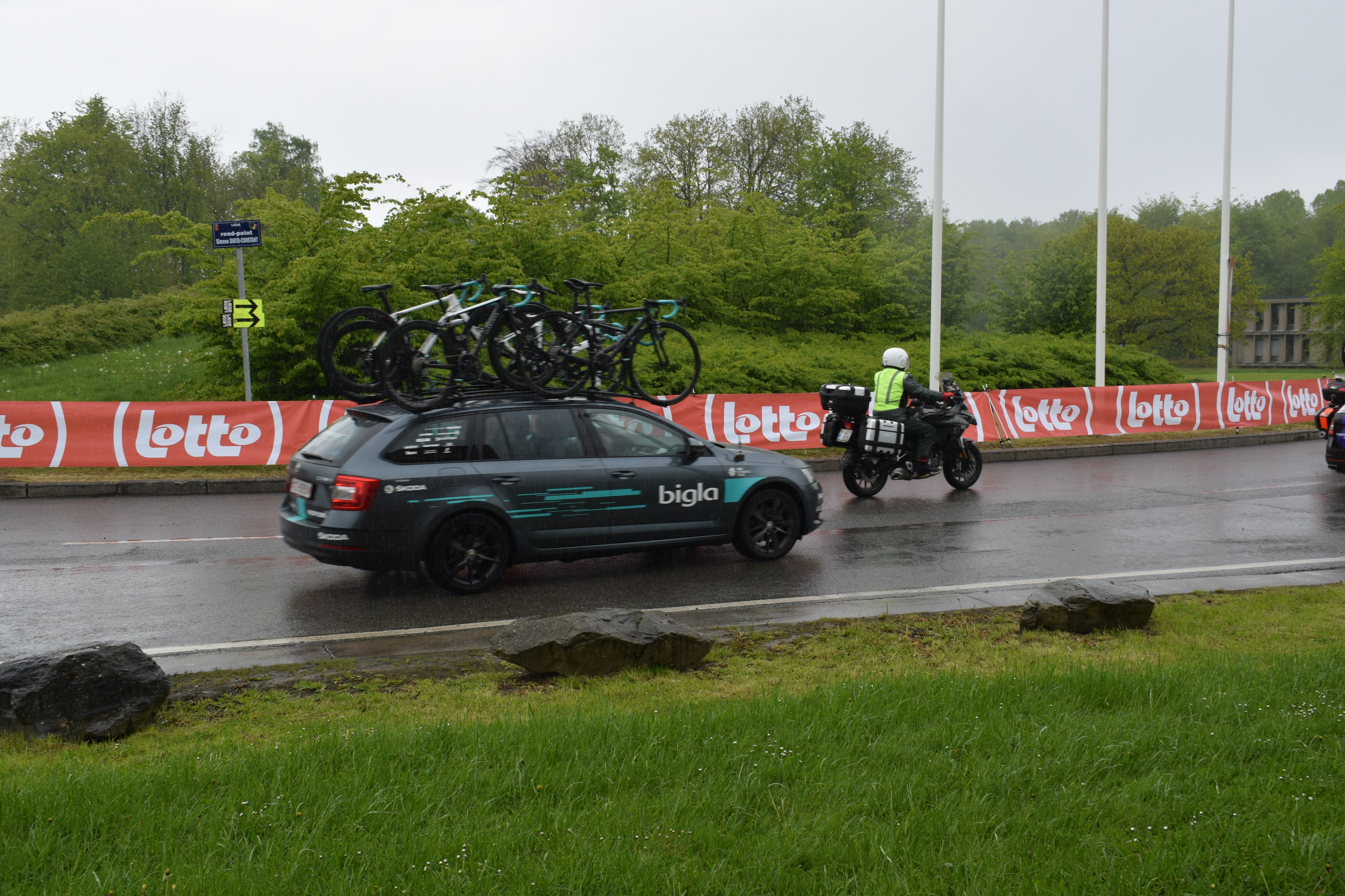 Vue du passage de la course cycliste Liège-Bastogne-Liège 2019, au rond-point Simone David-Constant, sur le campus du Sart Tilman de l'Université de Liège.